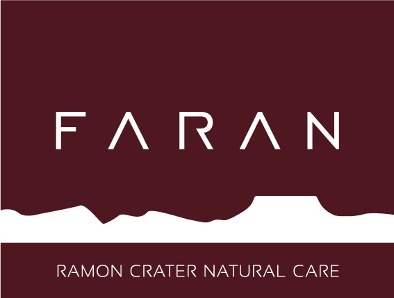 פארן קוסמטיקה טבעית